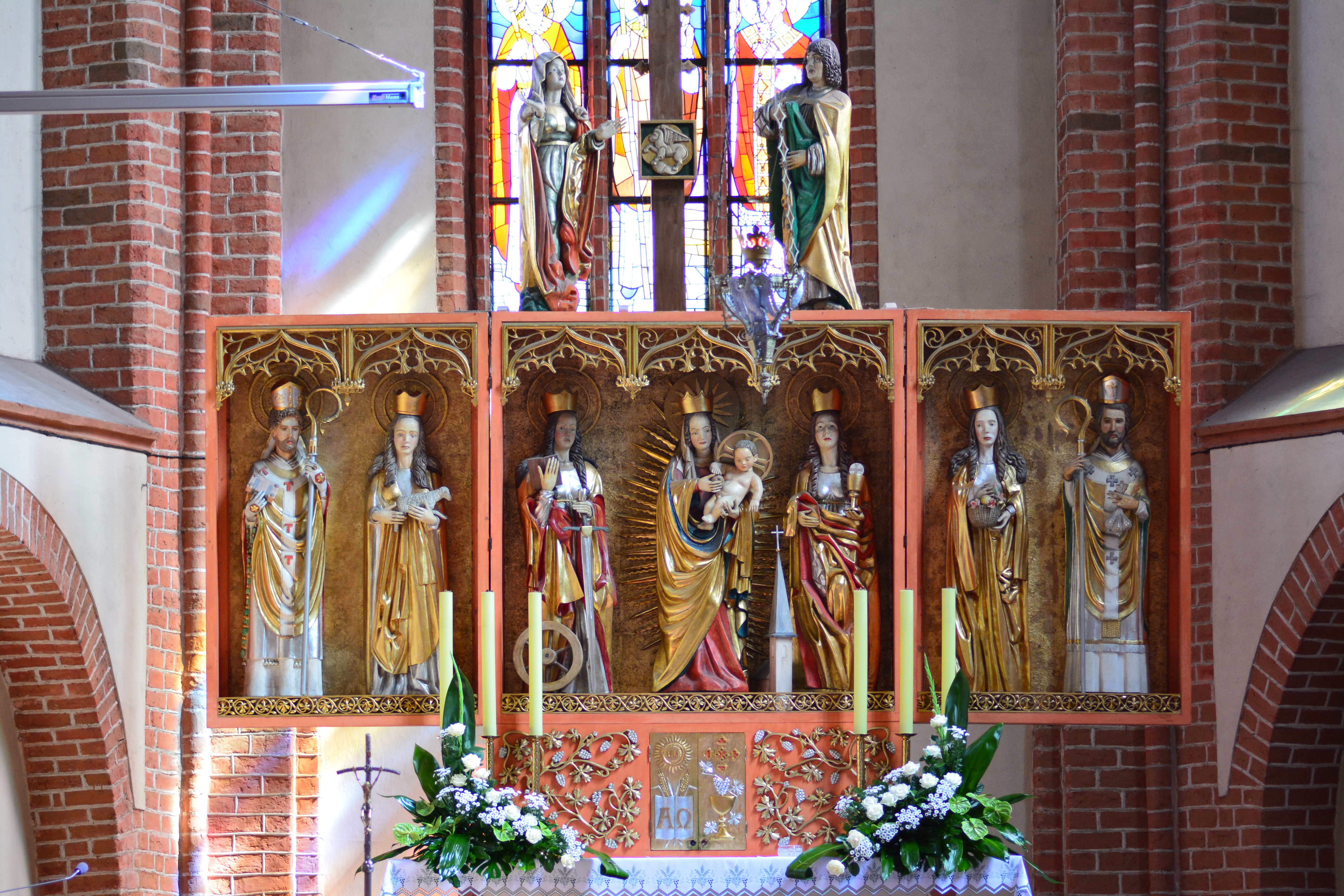 Ołtarz główny w kościele św. Katarzyny w Goleniowie